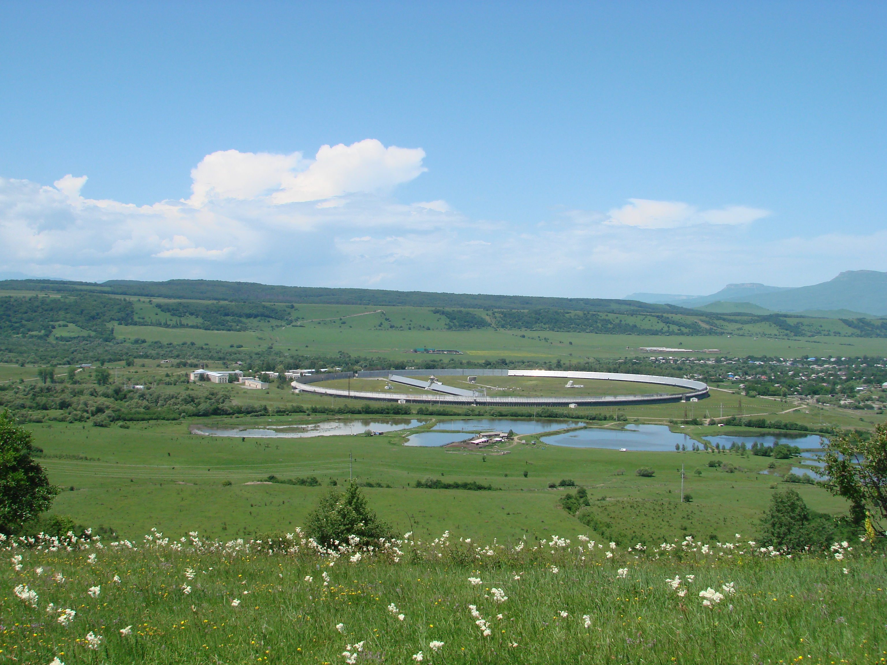 ратан 600